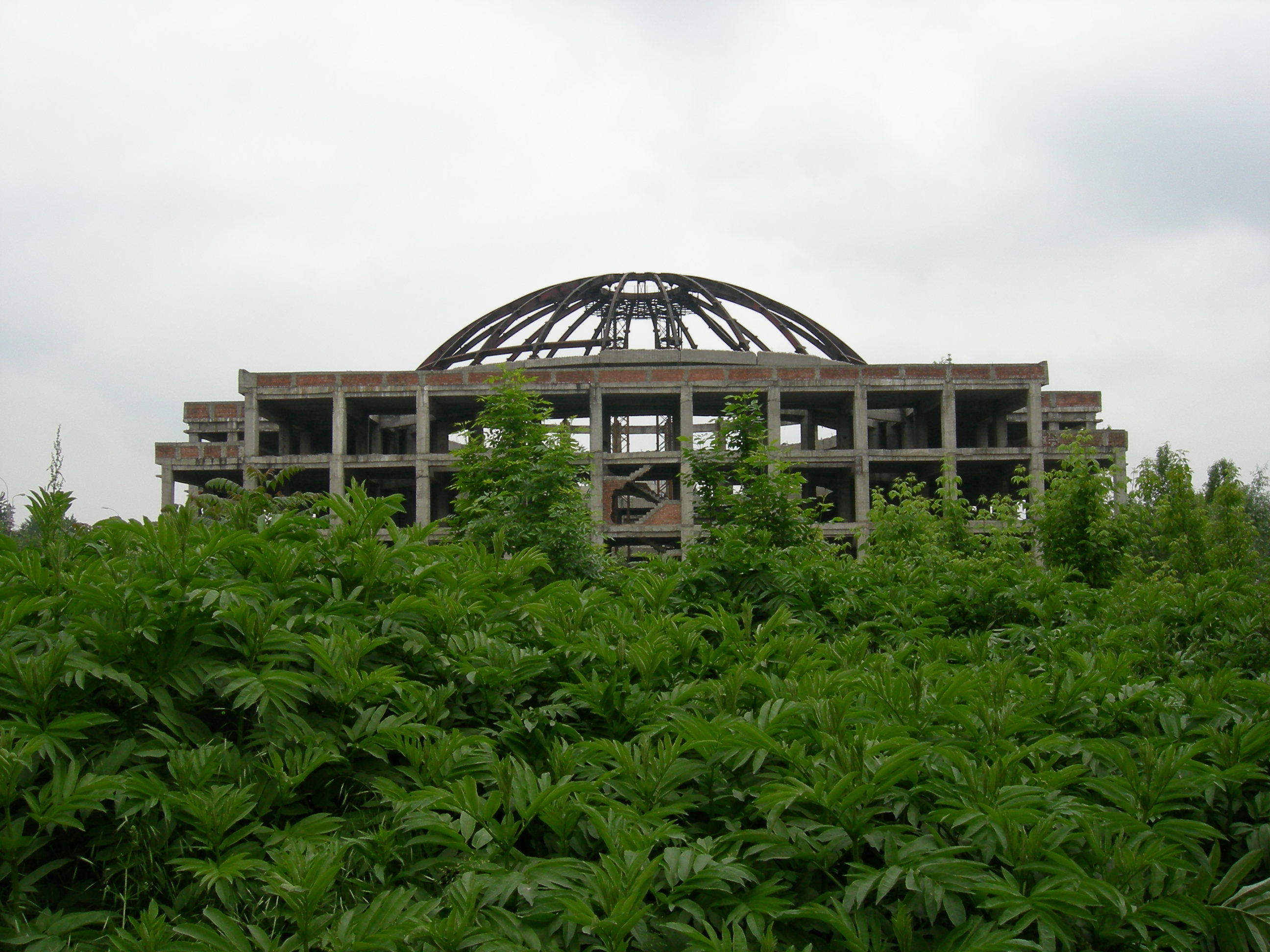 "Hunger circus" (circul foamei) in Rahova, Bucharest, Romania